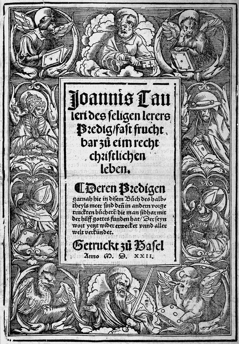 Johannes Tauler: Predig, fast fruchtbar zu eim recht christlichen leben, Basel, (Petri für Rynmann), 1522 Holzschnitt-Titelbordüre von Hans Holbein (erstmals Basel 1517 für Dat Boek des hillighen Evangelij des Hieronymus benutzt) mit Evangelistensymbolen, die hl. Petrus und Paulus und den Kirchenvätern Gregor, Augustinus, Ambrosius und Hieronymus.